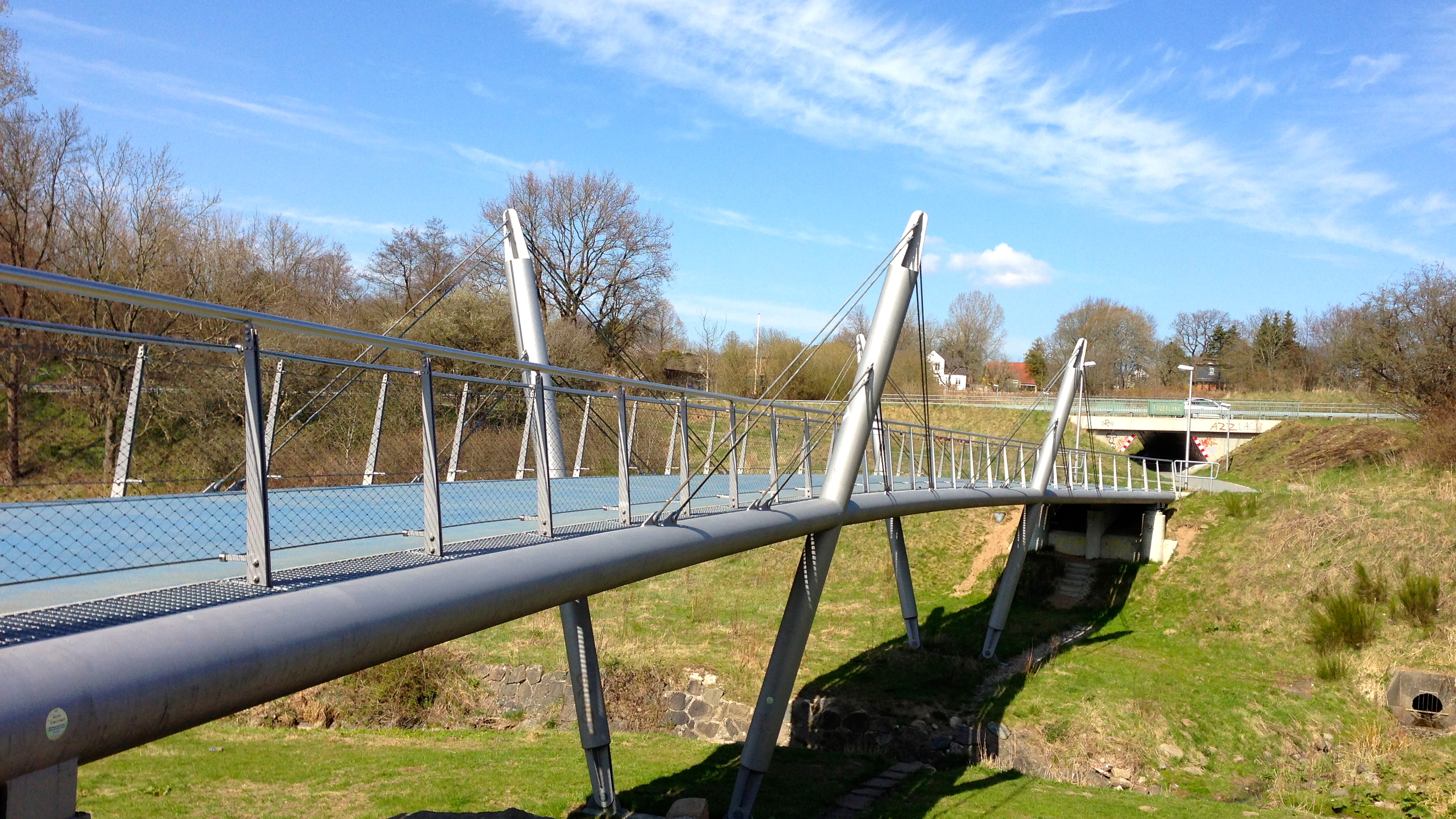 Die im Frühjahr 2009 gespannte 30 Meter hohe und 54 Meter lange Fuß- und Radwegbrücke Lautrupsbach Brücke, über dem Lautrupsbachtal in der Fruerlundsmühle, verbindet die Stadtteile Fruerlund und Engelsby zusammen.